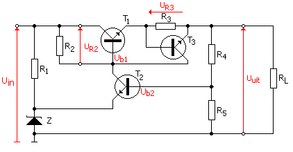 Uitgebreide werking van spanningsstabilisatie met stroombegrenzing door middel van een zener-diode, wordt gebruikt om de werking van een 78xx spanningsregelaar toe te lichten.